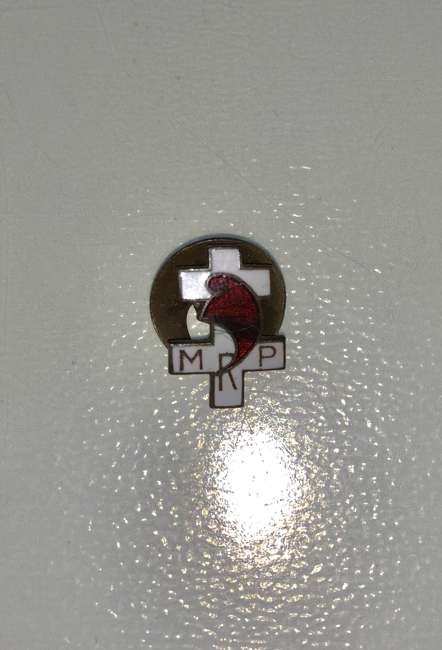 Pin's Mouvement République Populaire